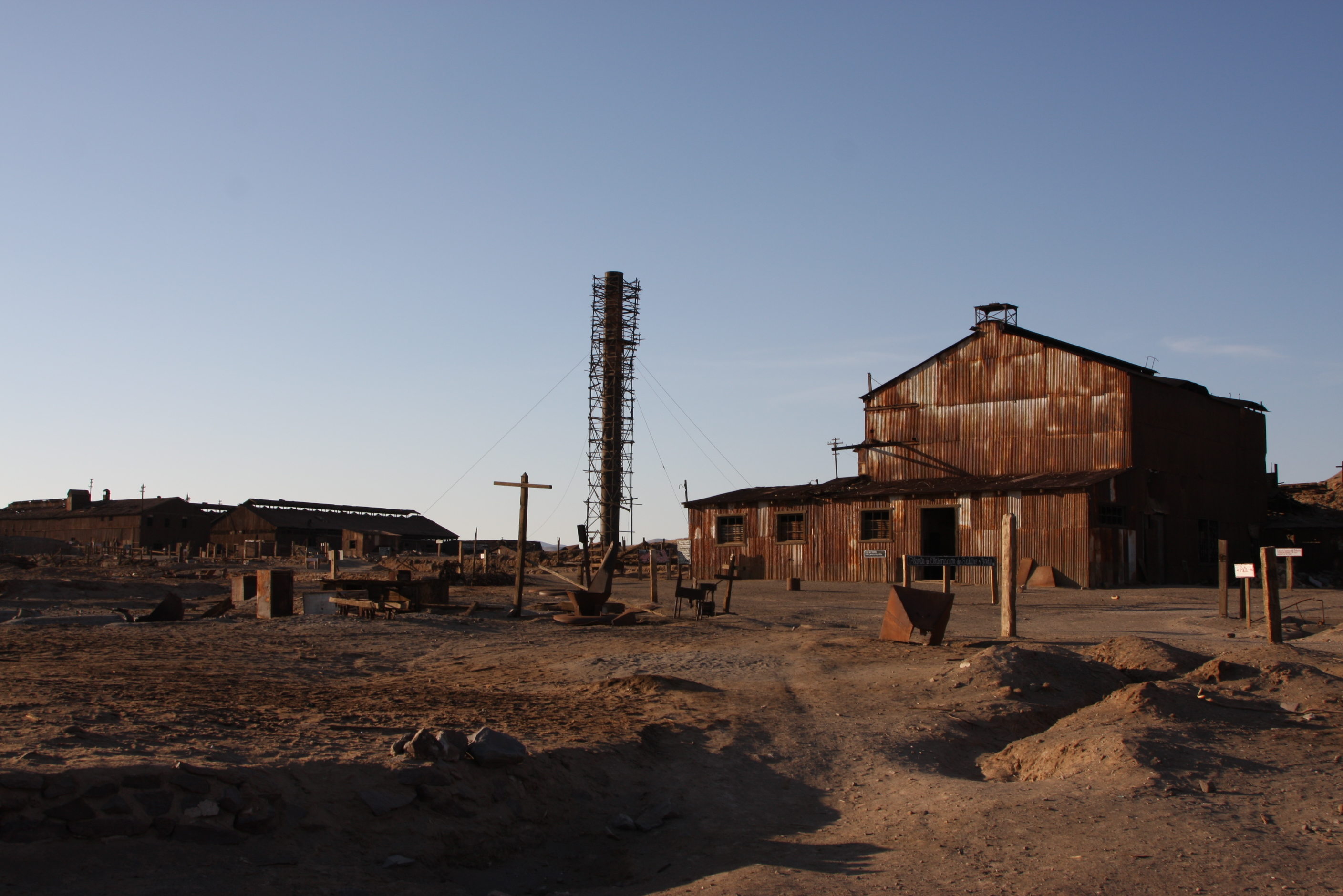 Humberstone 1